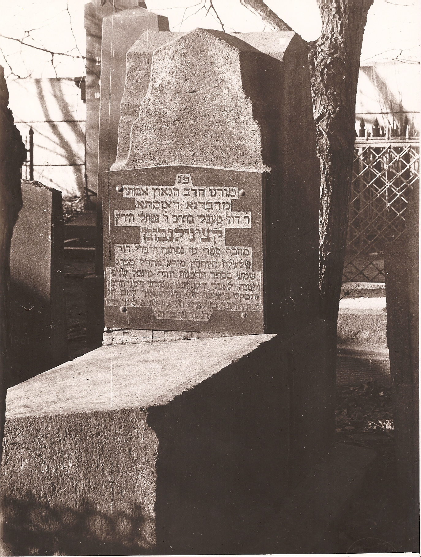 המצבה על קברו של הרב דוד טבל קצנלנבוגן